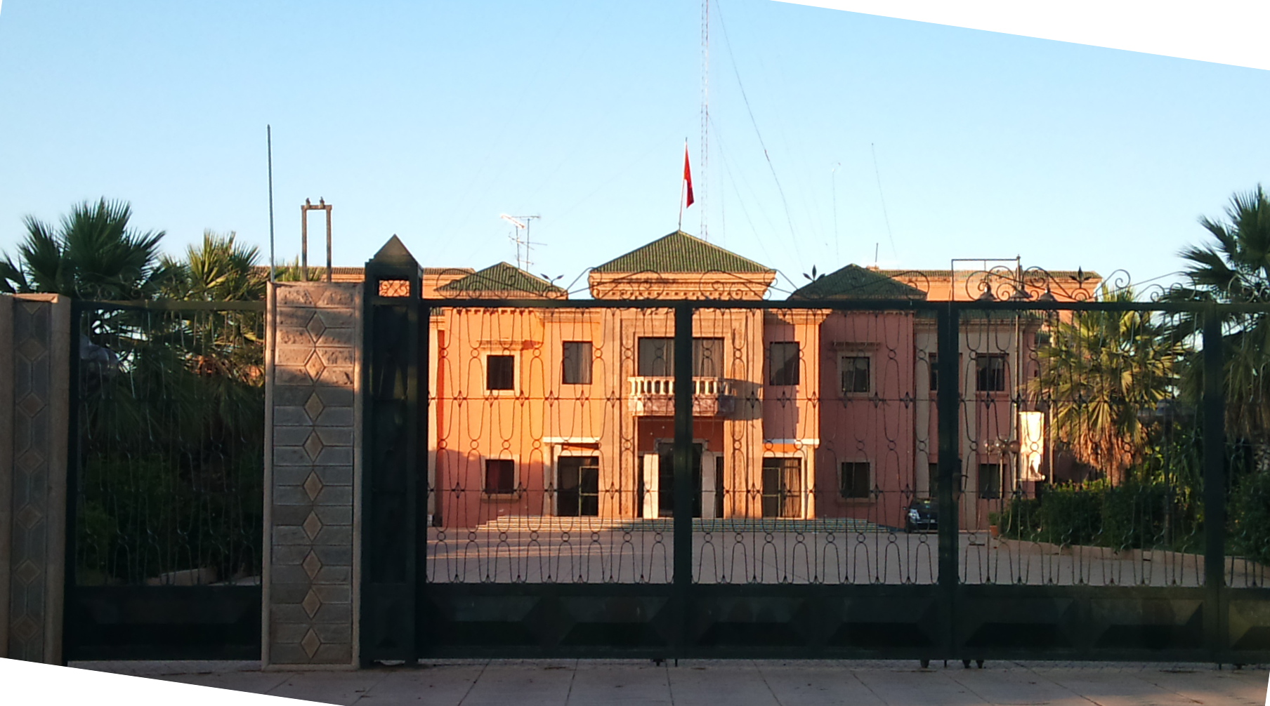 Het gemeentehuis van Berkane